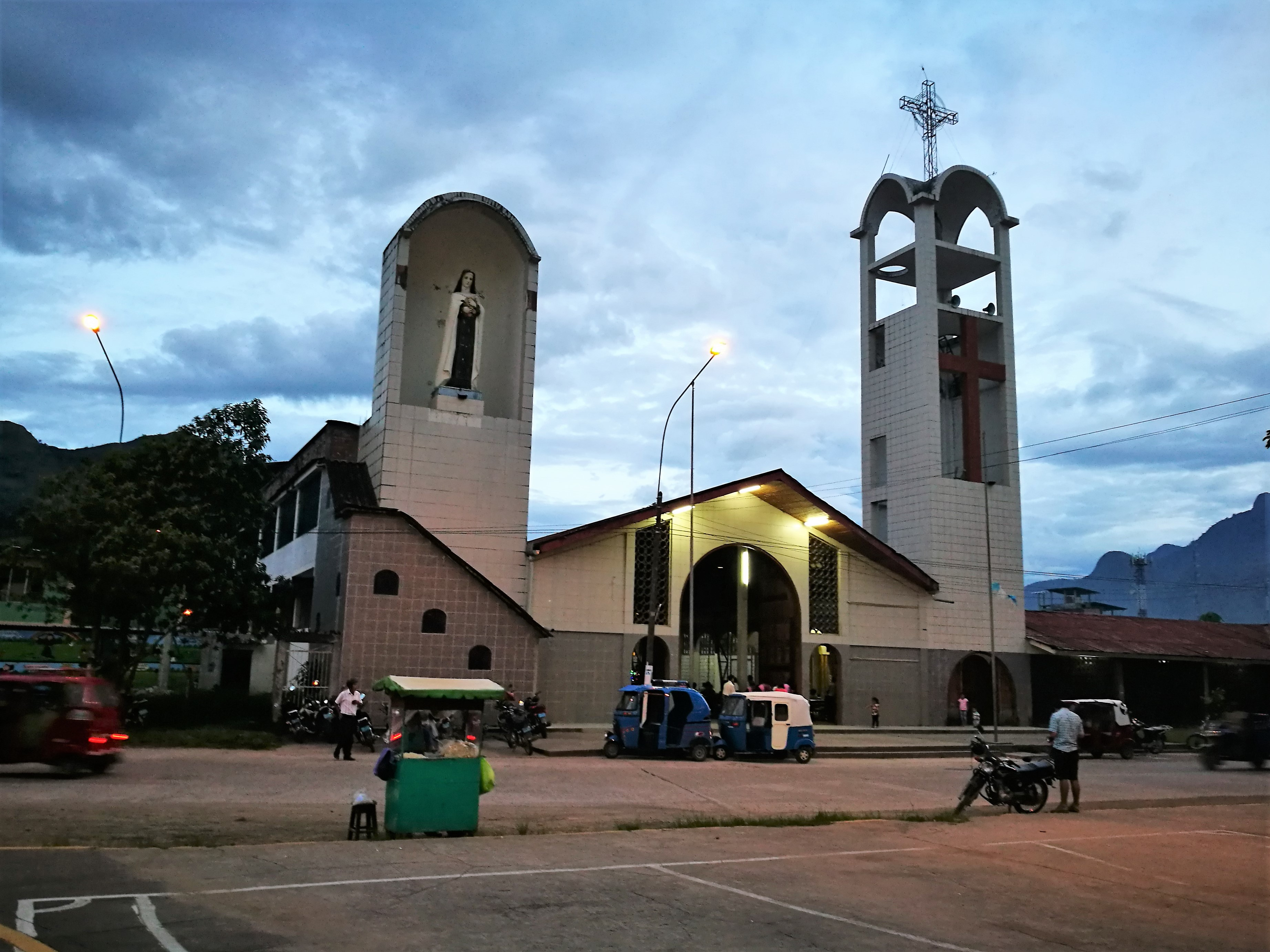 Església de Santa Teresita, Tingo María